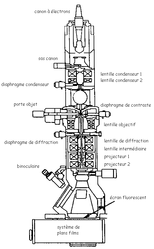 Schéma d'un microscope électronique en transmission Source : département de science des matériaux de Polytech'Lille [1]